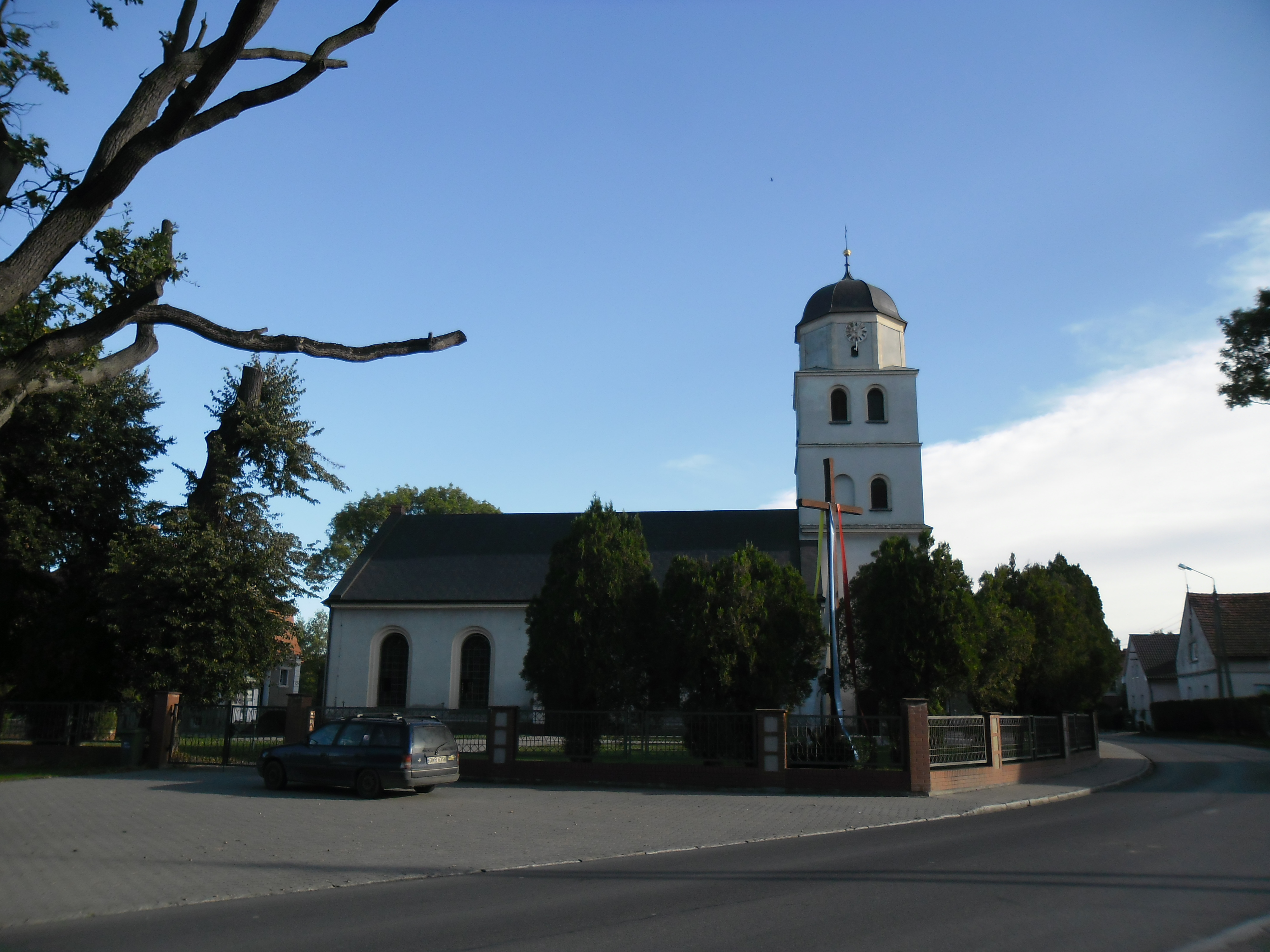 Pasikurowice, ul. Wrocławska 48 - dawny kościół ewangelicki, obecnie rzymskokatolicki parafialny pw. św. Józefa (zabytek nr A/1037 z 23.01.2008)